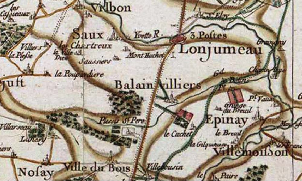 Carte établie par Cassini en 1747 de la région de Ballainvilliers (91).